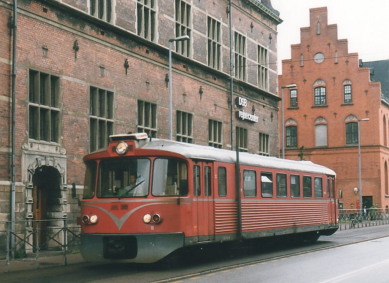 Former Nærumbanen Lynette DMU in service at Hornbækbanen in Helsingør, Denmark